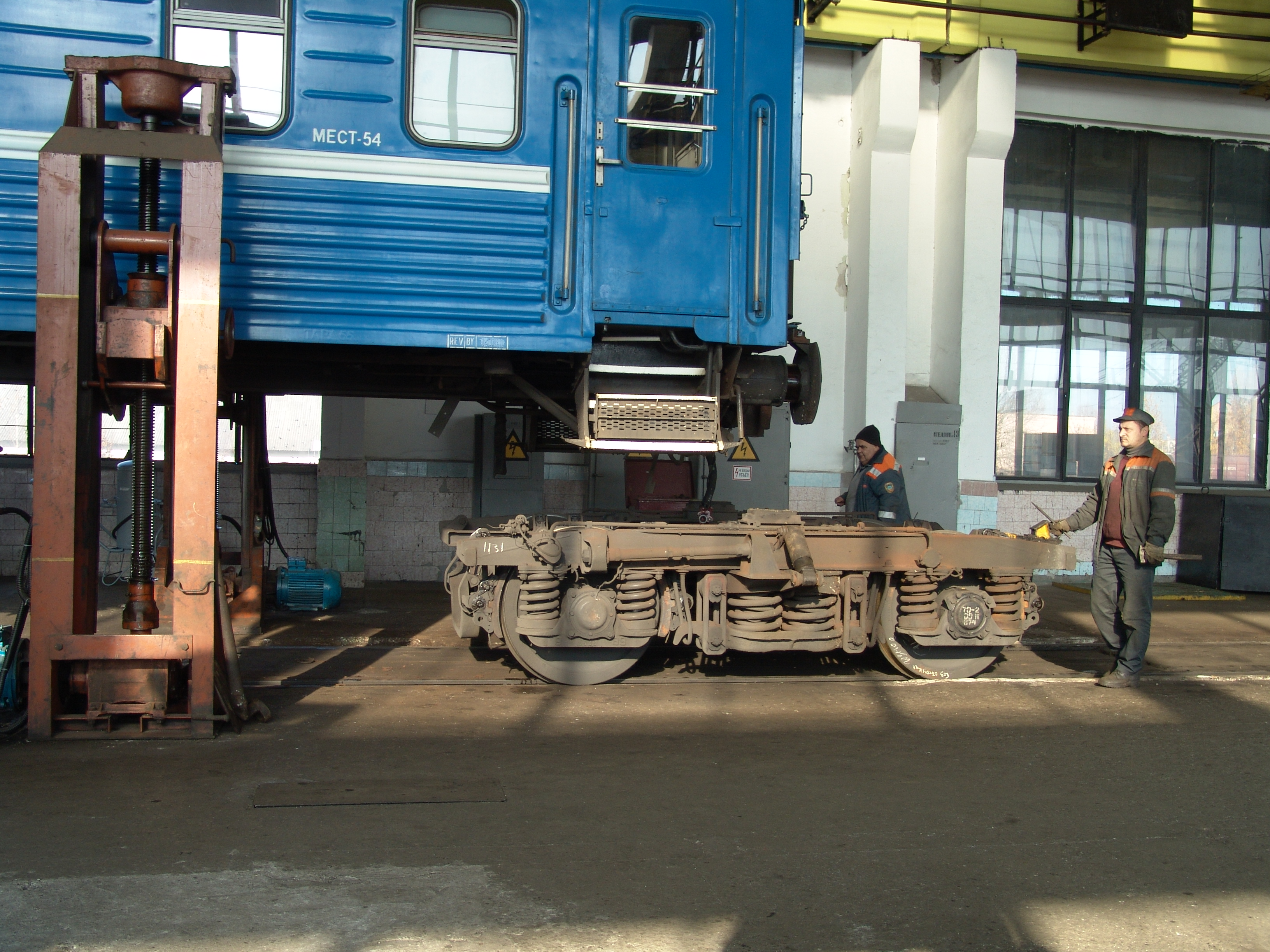 Смена тележки вагона в городе Брест (Республика Беларусь)